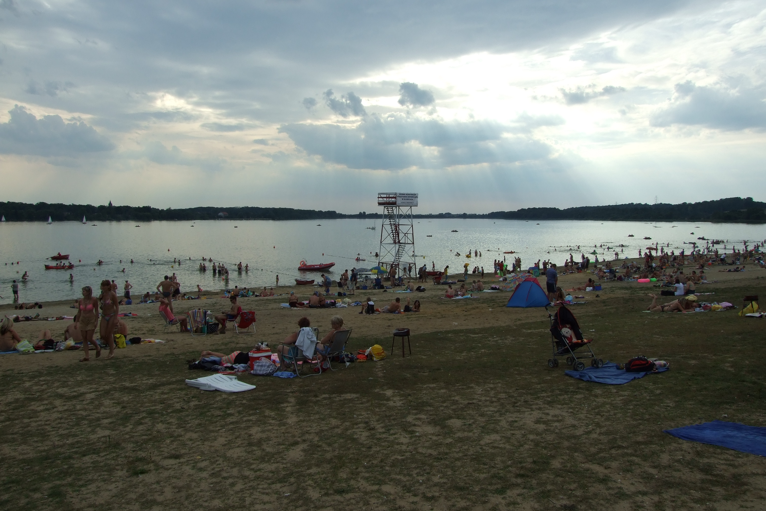 Jezioro Pławniowice latem